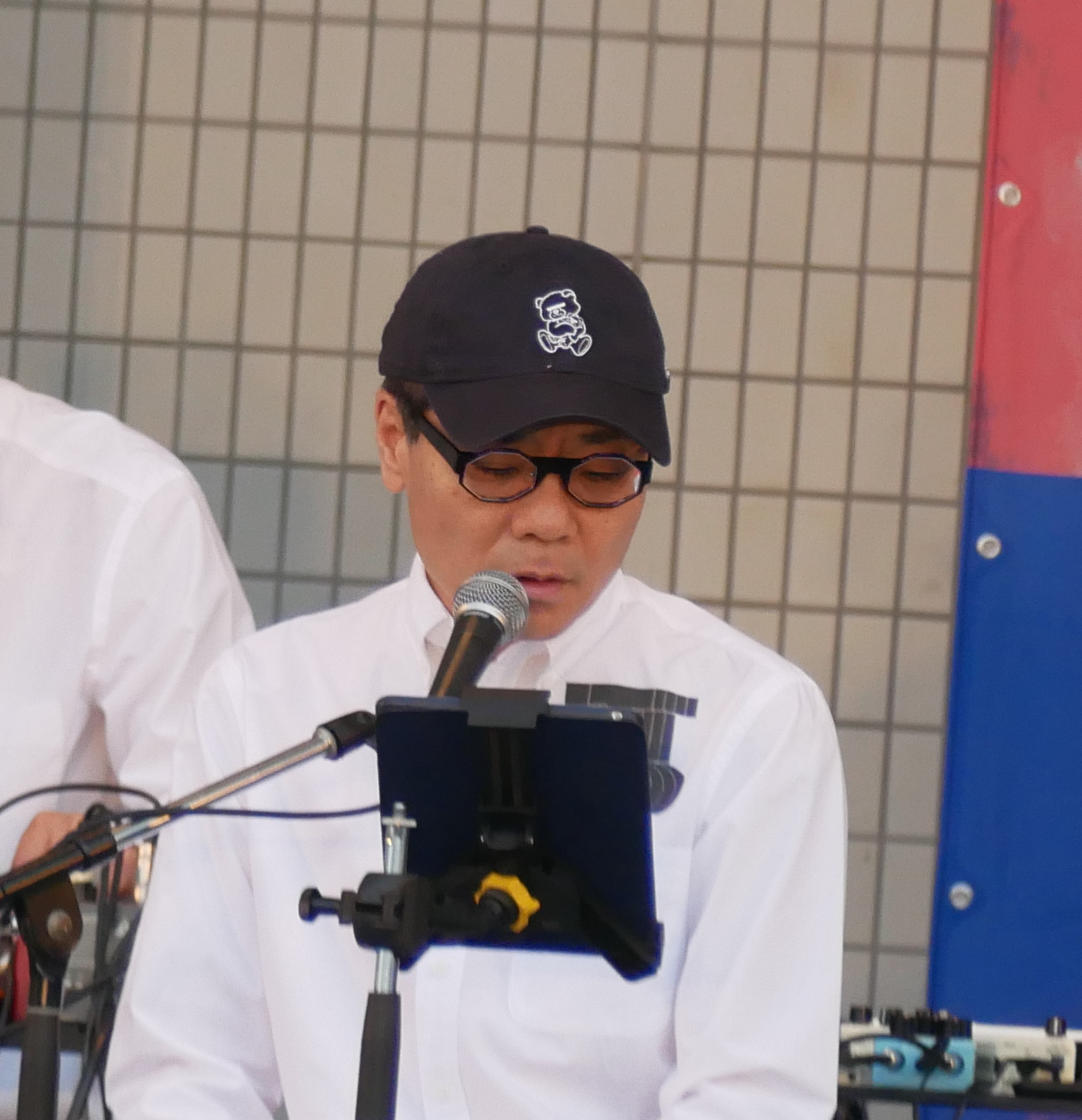 いとう せいこう（Seiko Ito、1961年3月19日 - ）。「アースデイ・コンサート2019」に出演中。代々木公園野外ステージにて。 Panasonic Lumix DMC-GX7 Mark II